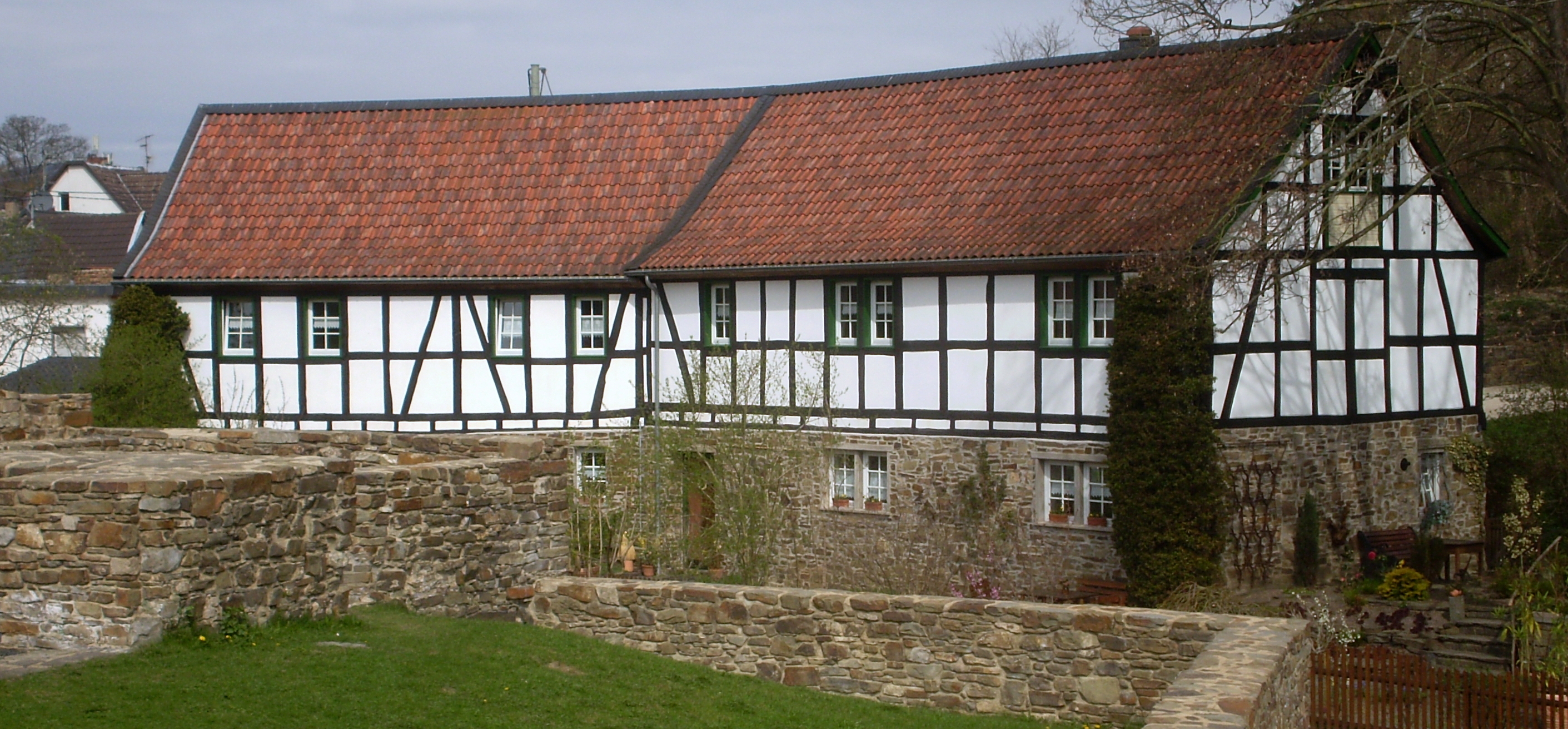 Ehemaliges Wirtschaftsgebäude der Unteren Burg, Weinbergsweg 2, Rheinbreitbach